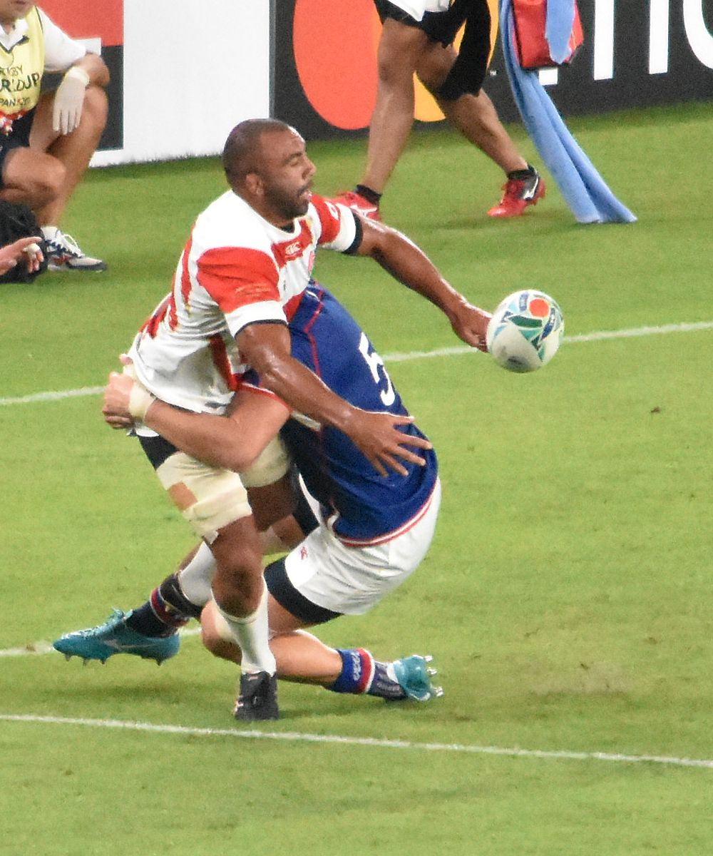 リーチマイケル